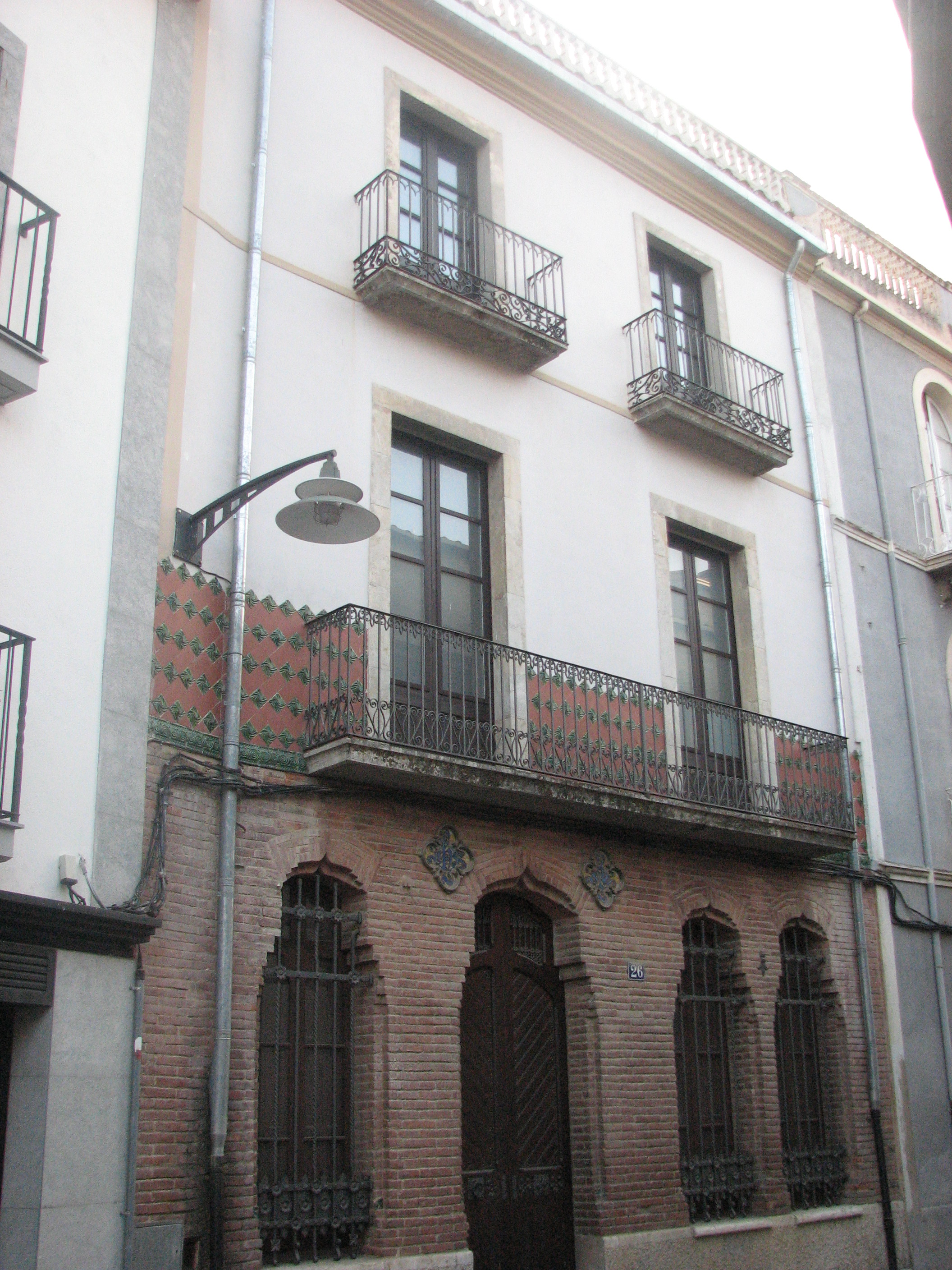 Ca n'Aragó (Santa Coloma de Farners)